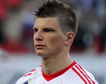 Андрей Аршавин в 2012 году.